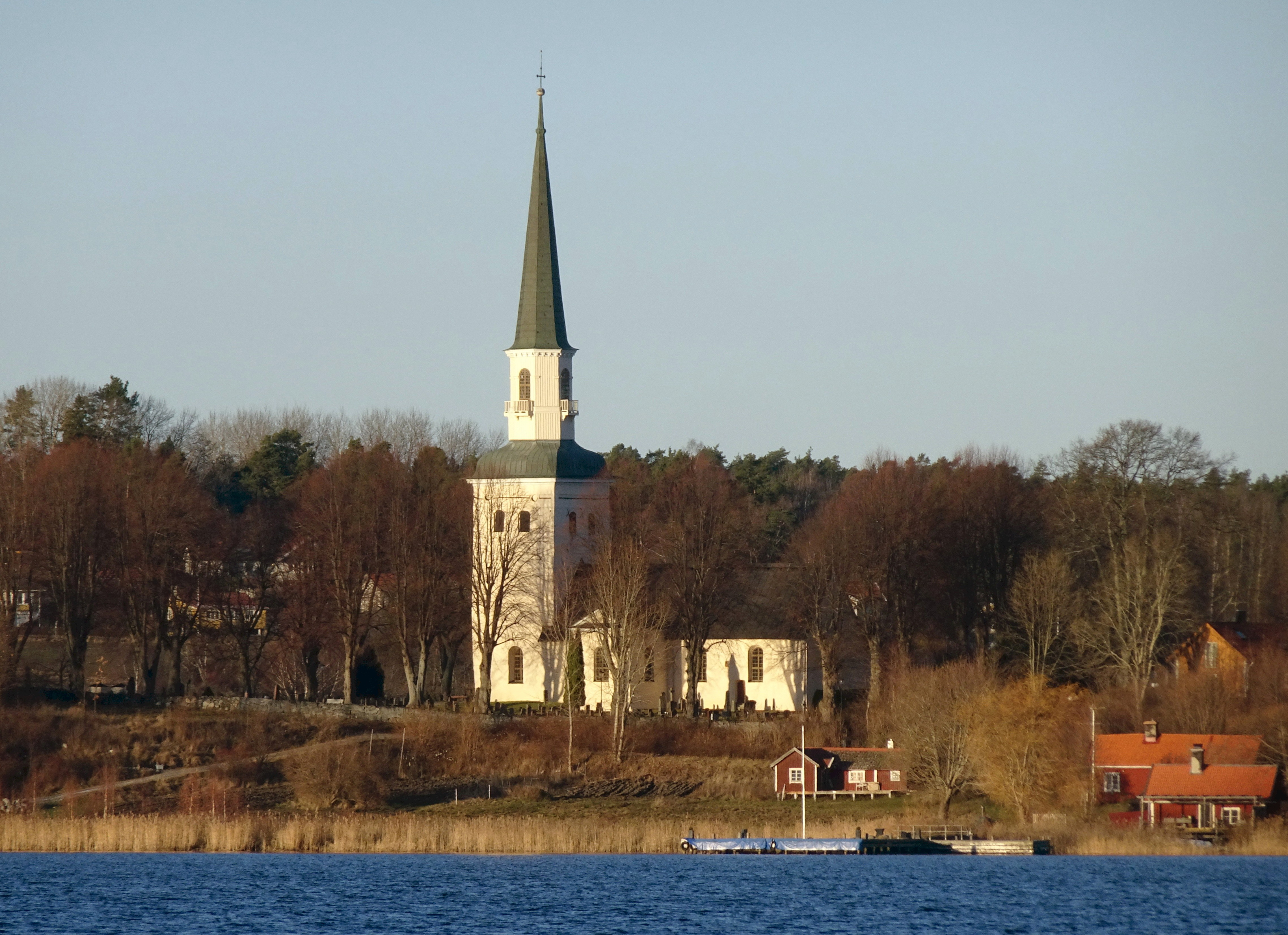 Ekerö kyrka vy över Kyrkfjärden från Sturehov